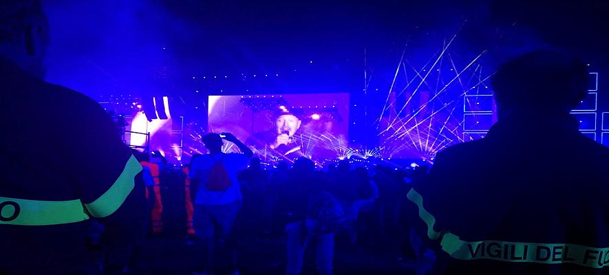 Vigili del fuoco al concerto di Vasco Rossi al Modena Park